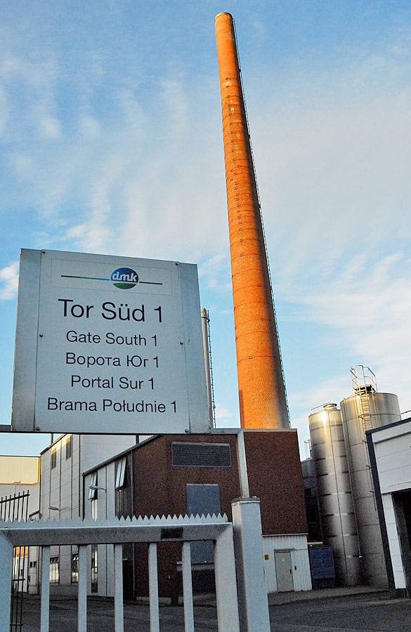 Zeven Aspe dmk